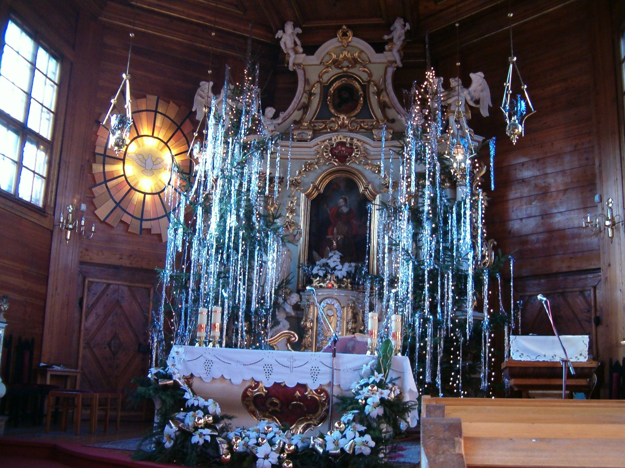 Ołtarz główny w kościele parafialnym pw. Św. Tekli w Dobrzycy, powiat pleszewski, woj. wielkopolskie.